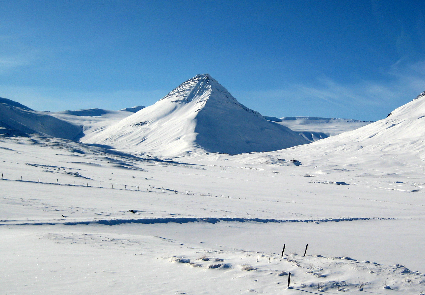 Hnjótafjall, Heljardalsheiði, Skallárdalur